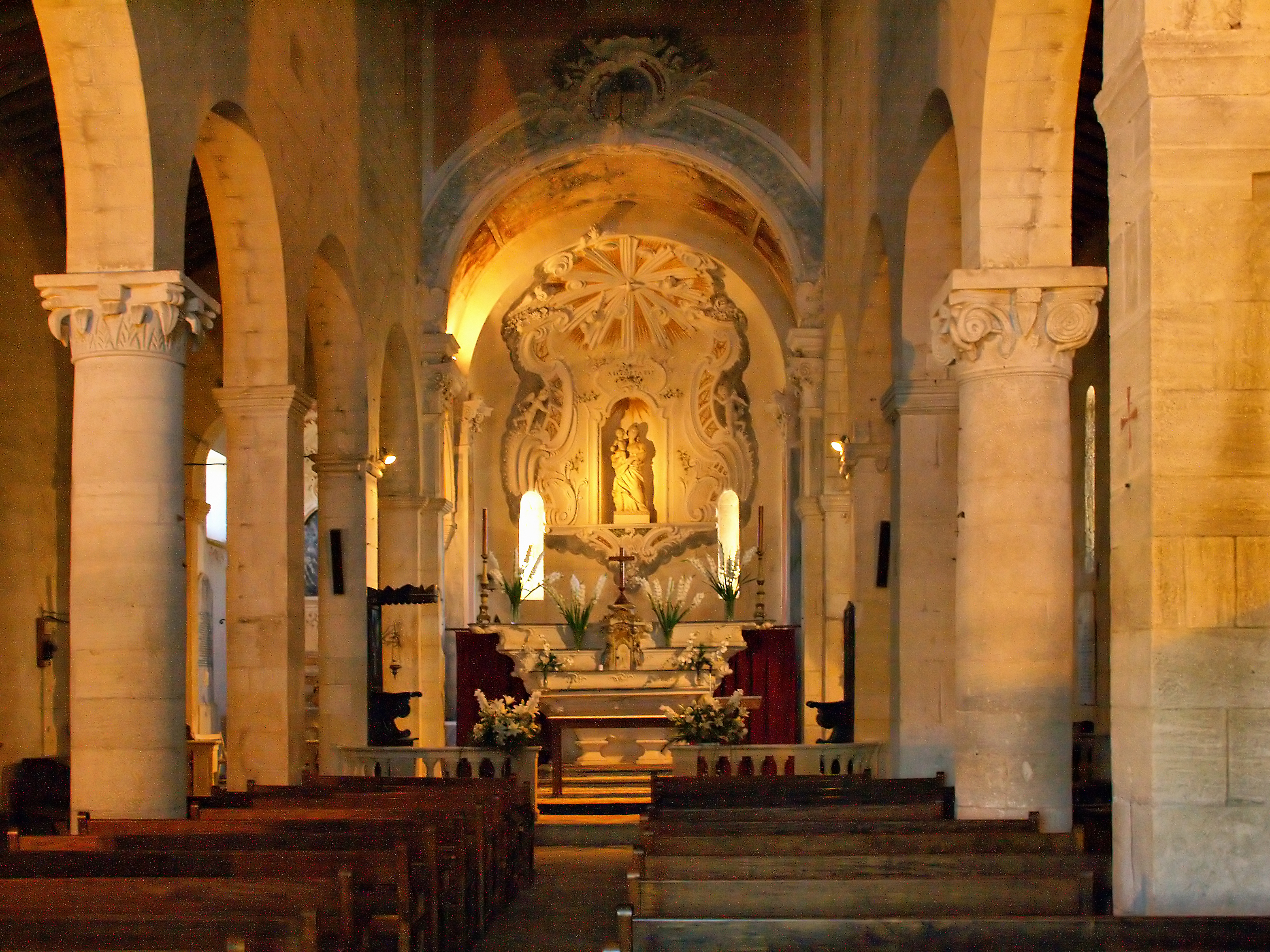 Saint-Florent - la cathédrale du Nebbiu - la nef